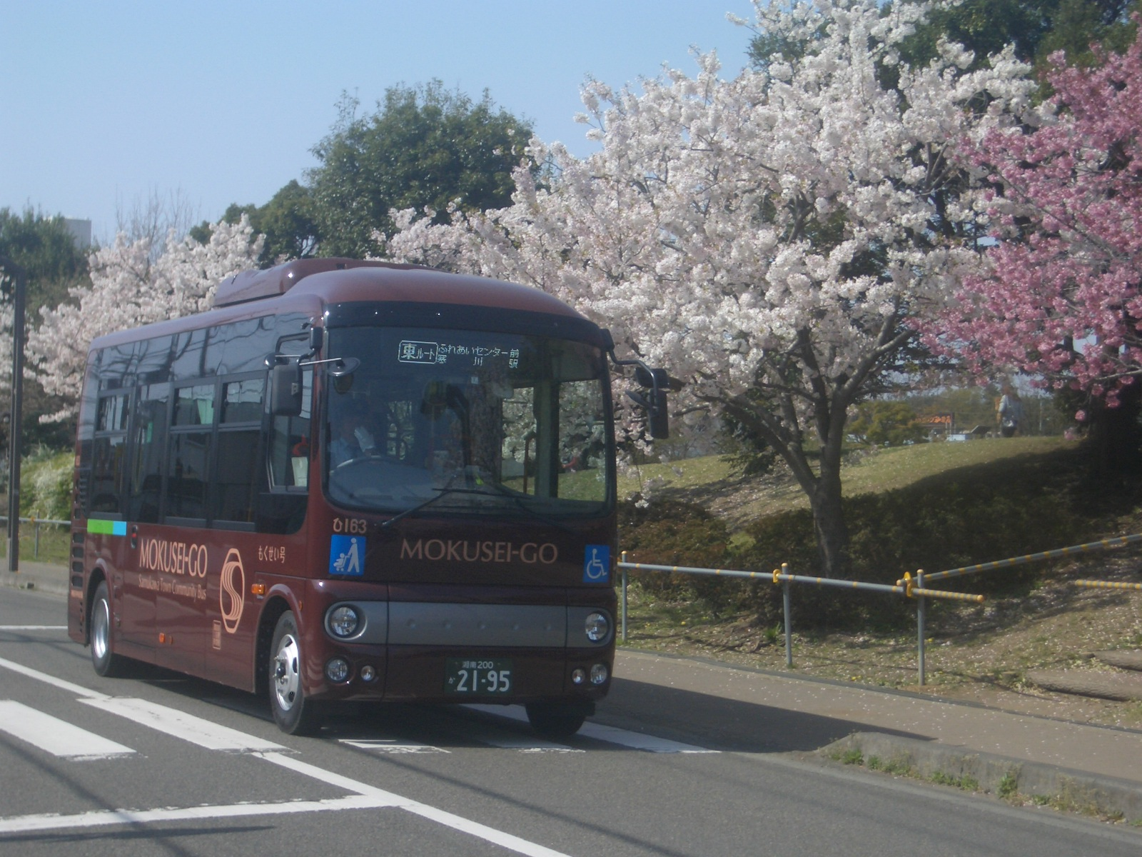 寒川町コミュニティバス「もくせい号」、「高座のこころ。」ブランドカラー（サムカワブラウン）ラッピング、2018年新車導入